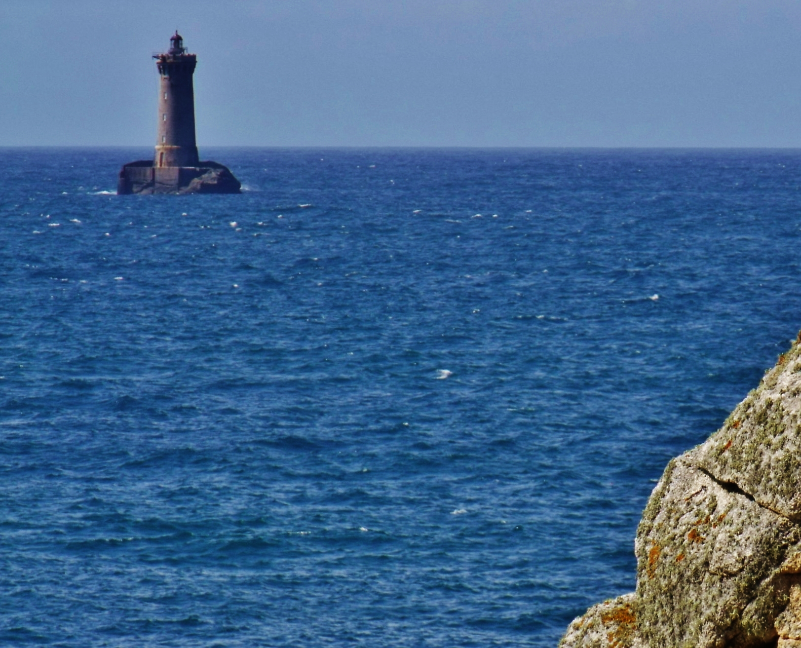 Faro Canal del Four en Porspoder - Finistère - Bretaña